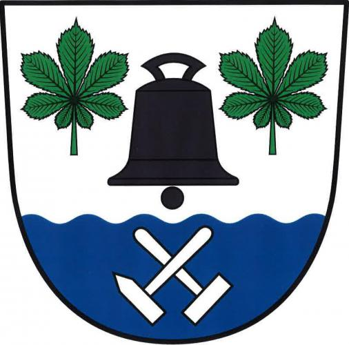 Černov - znak obce